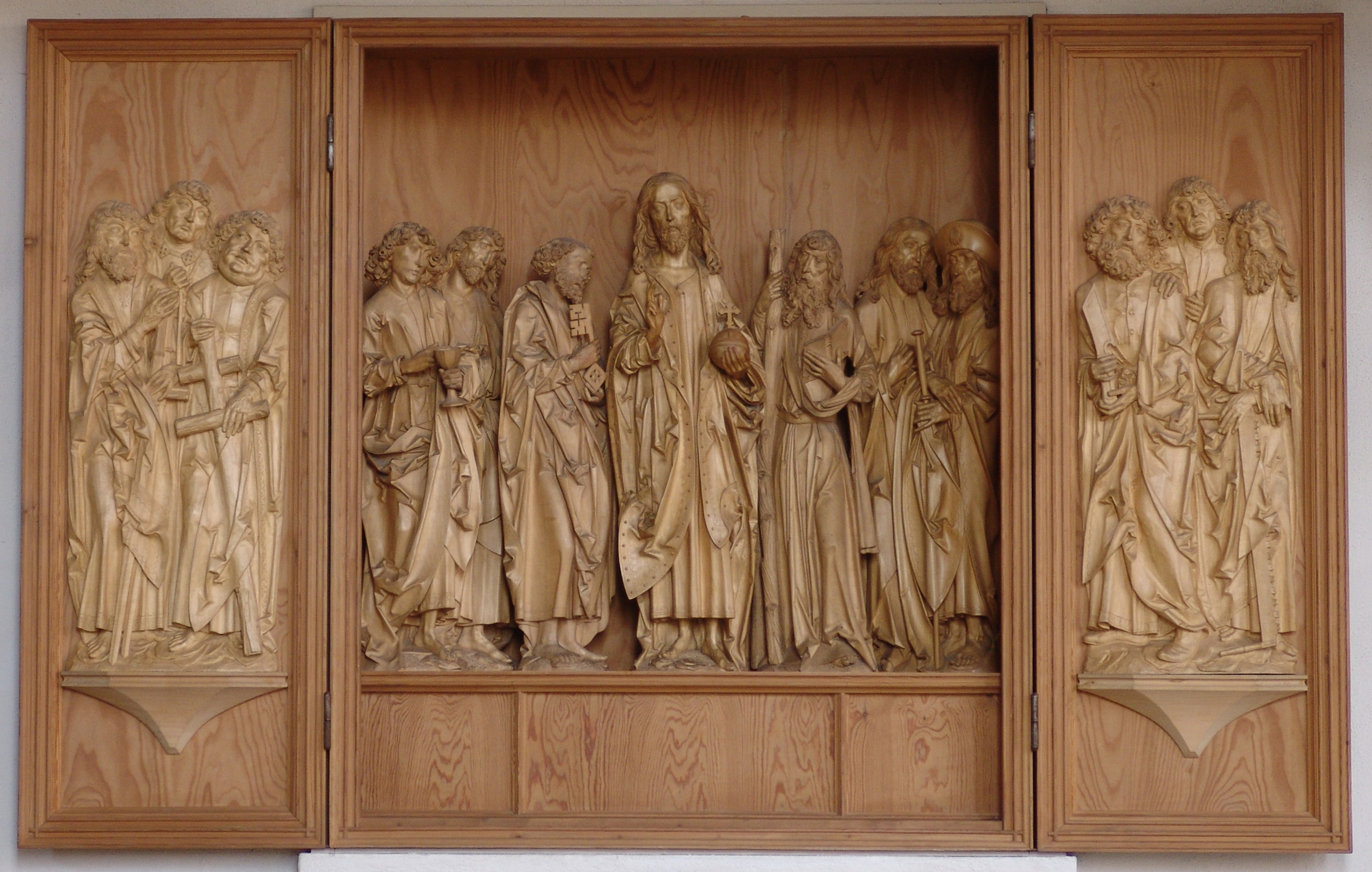 Kopie des Apostelretabels von Tilman Riemenschneider in der Kirche St. Maria am See in Bad Windsheim - Original befindet sich im Kurpfälzischen Museum in Heidelberg